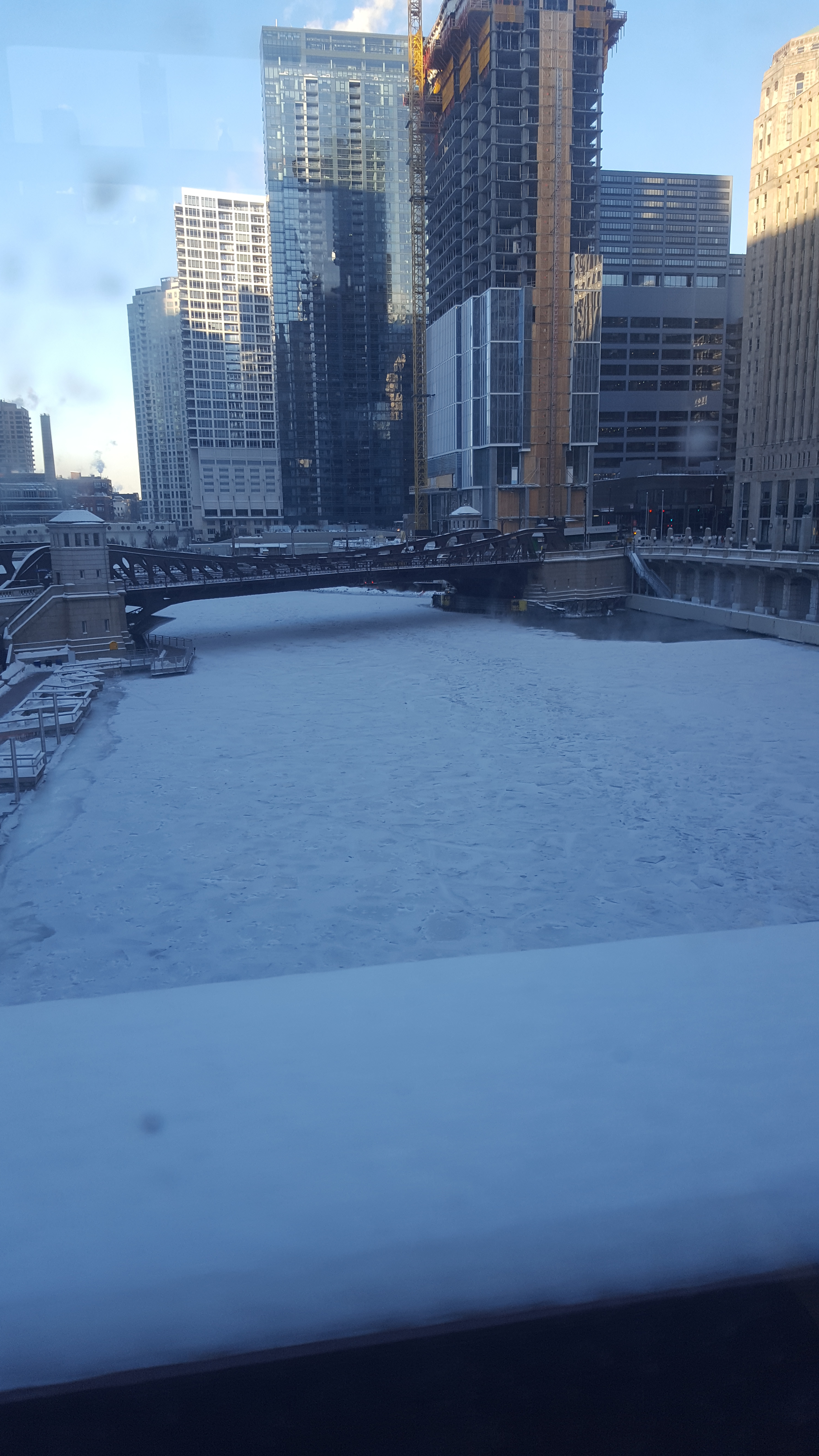 polar vortex photos Chicago (39980445483).jpg